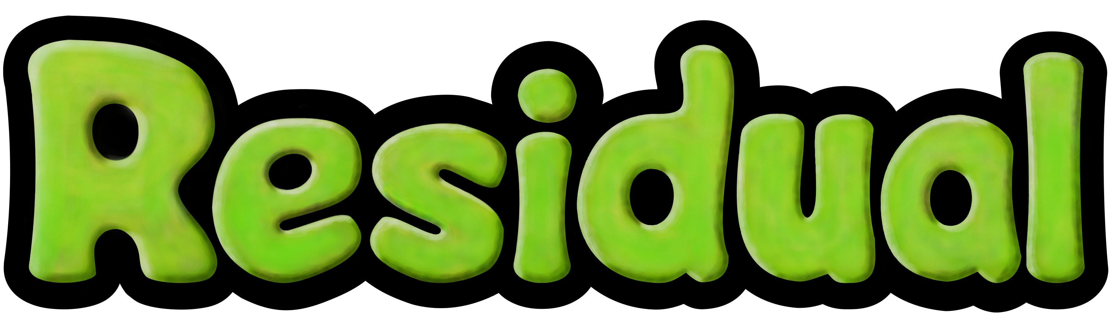 ResidualVM icon